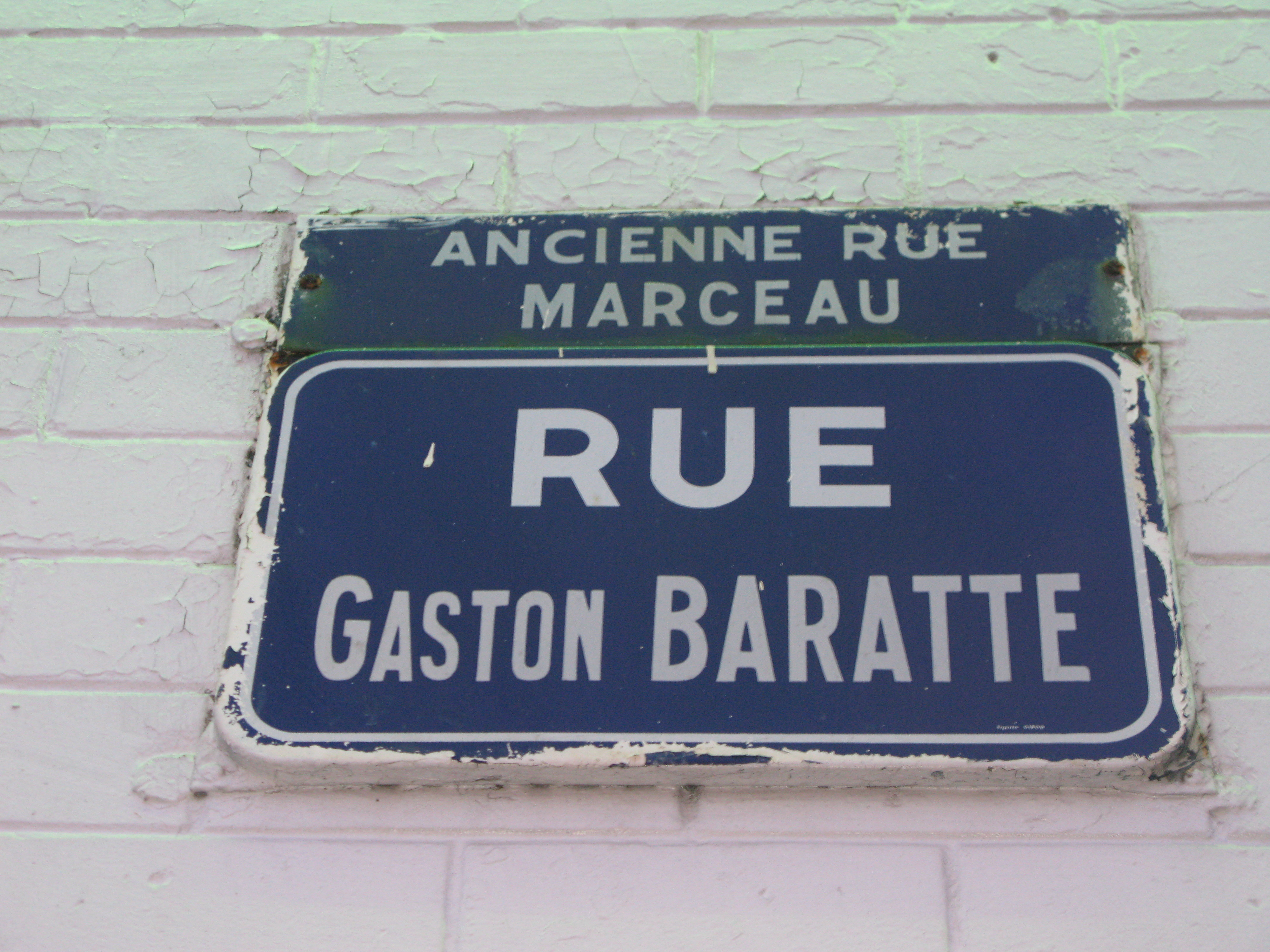 Panneau de rue, rue Gaston Baratte et ex-rue Marceau, Villeneuve d'Ascq